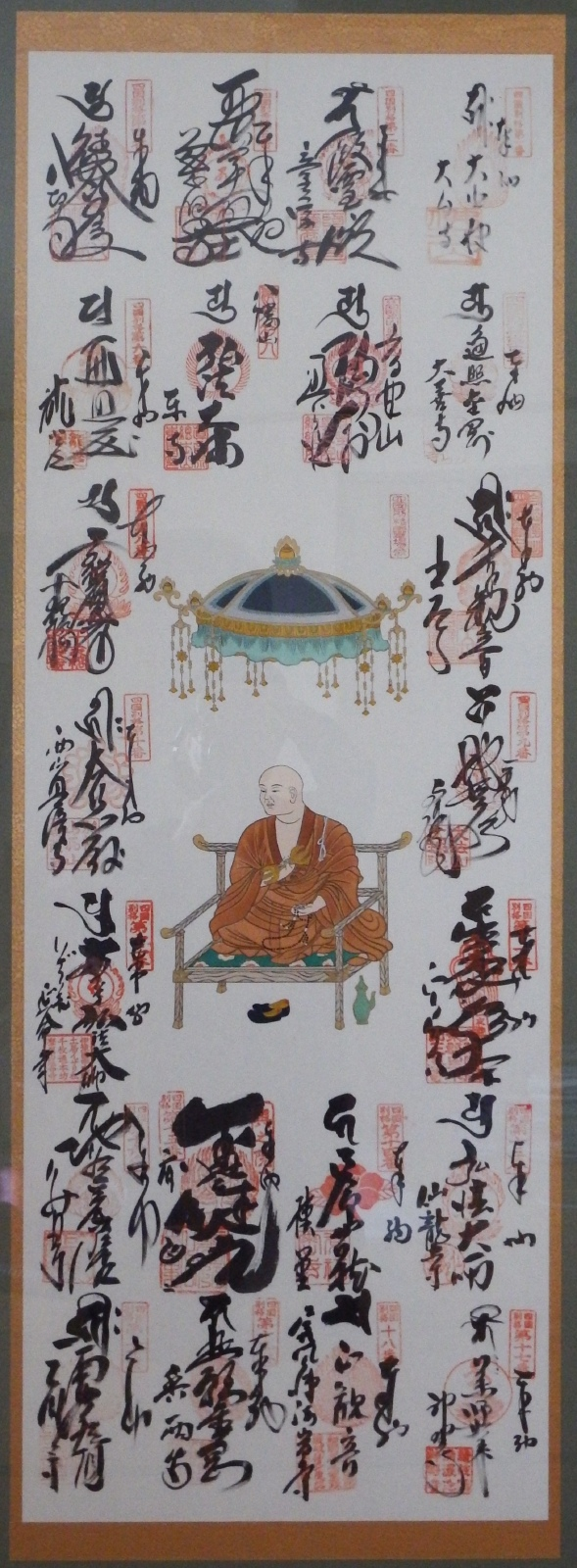 四国別格20霊場の掛け軸